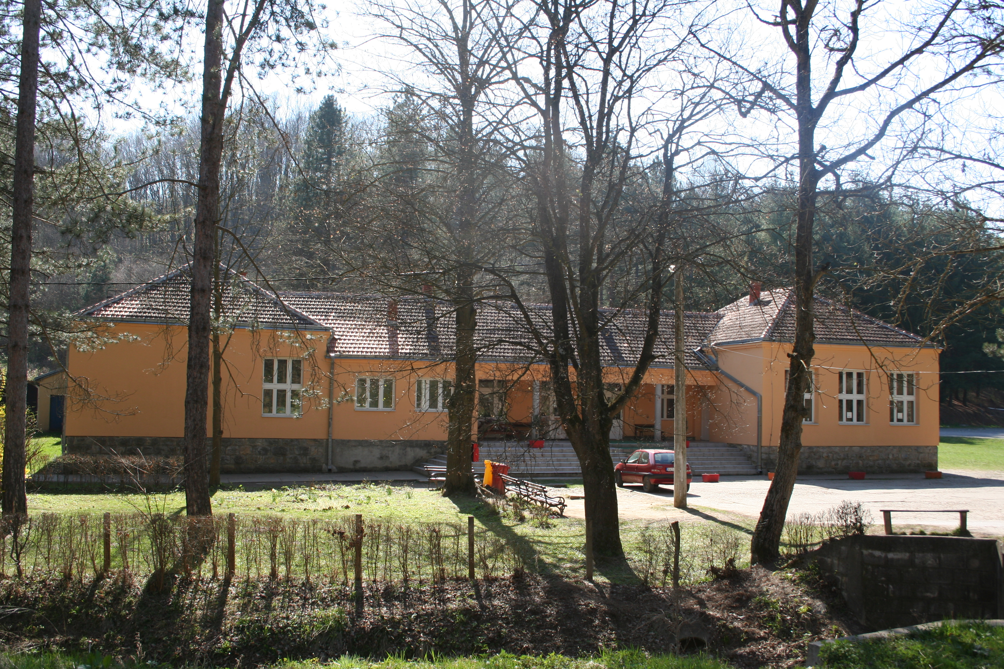 Seoska škola, Brankovina